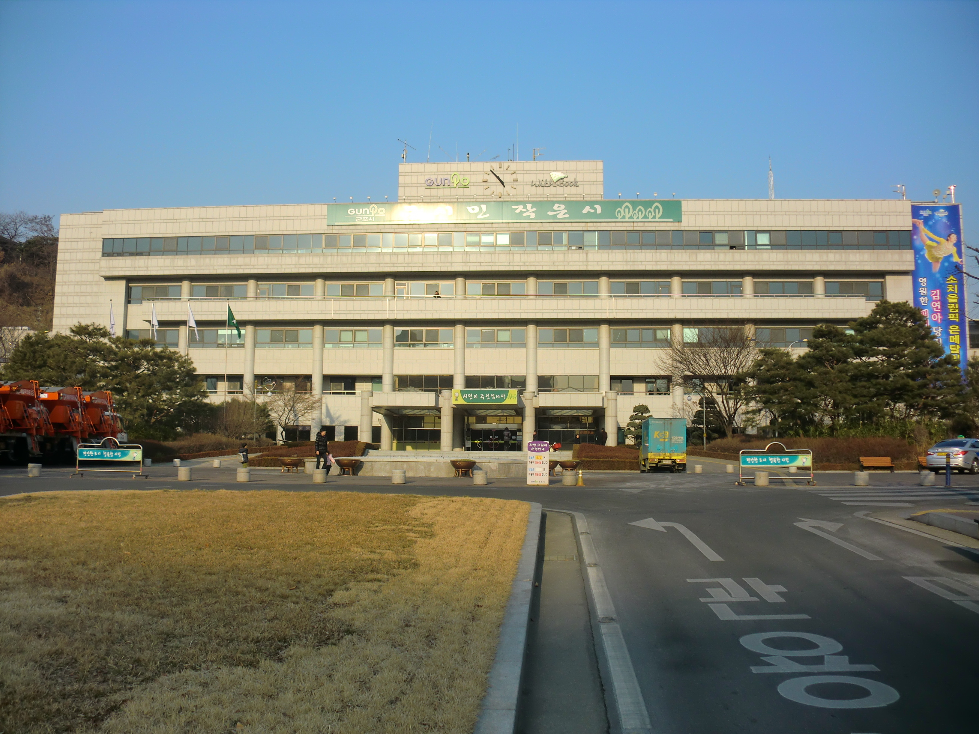 경기도 군포시에 있는 군포시청